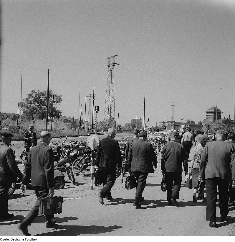 Original image description from the Deutsche Fotothek Stralsund. VEB Volkswerft Stralsund, Arbeiter auf dem Arbeitsweg